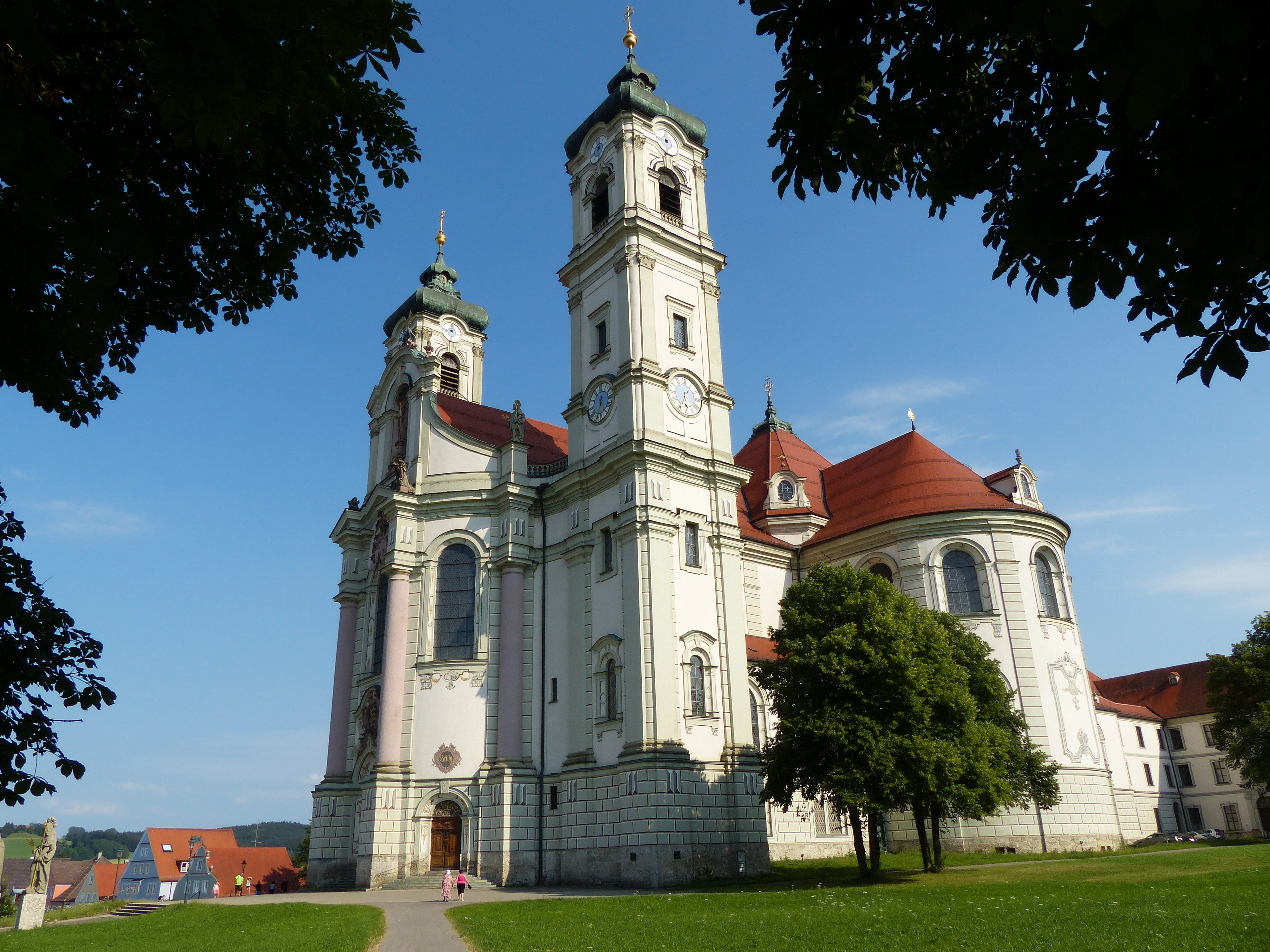 Basilka OttobeurenThis is a photograph of an architectural monument.